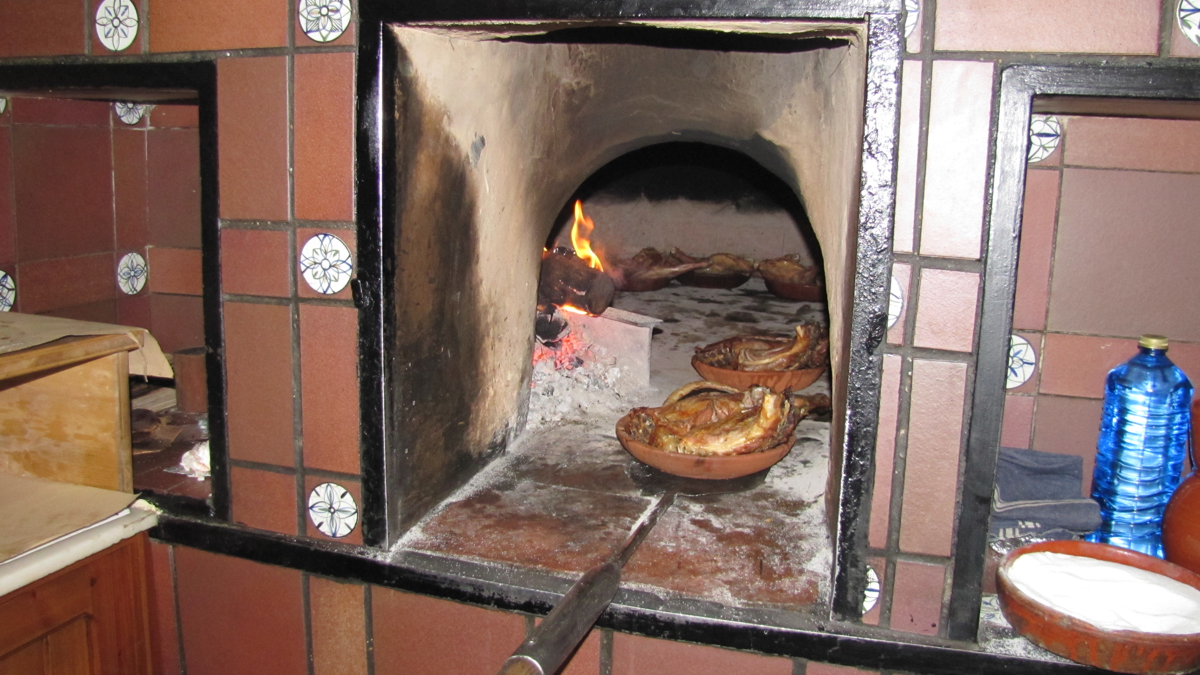 Horno de Leña con cuartos de lechazo asado (cordero asado), en el Asador Rafael Corrales, de Aranda de Duero (Burgos), España. Casa fundada en 1902.